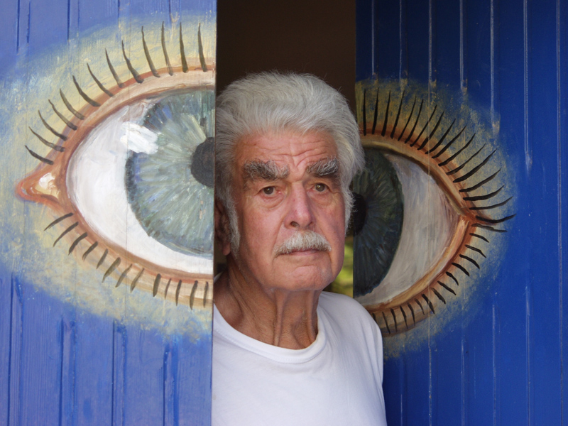 Foto von Wolfgang Lettl, 2002